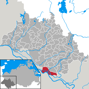 Dömitz in Mecklenburg-Vorpommern - district Ludwigslust